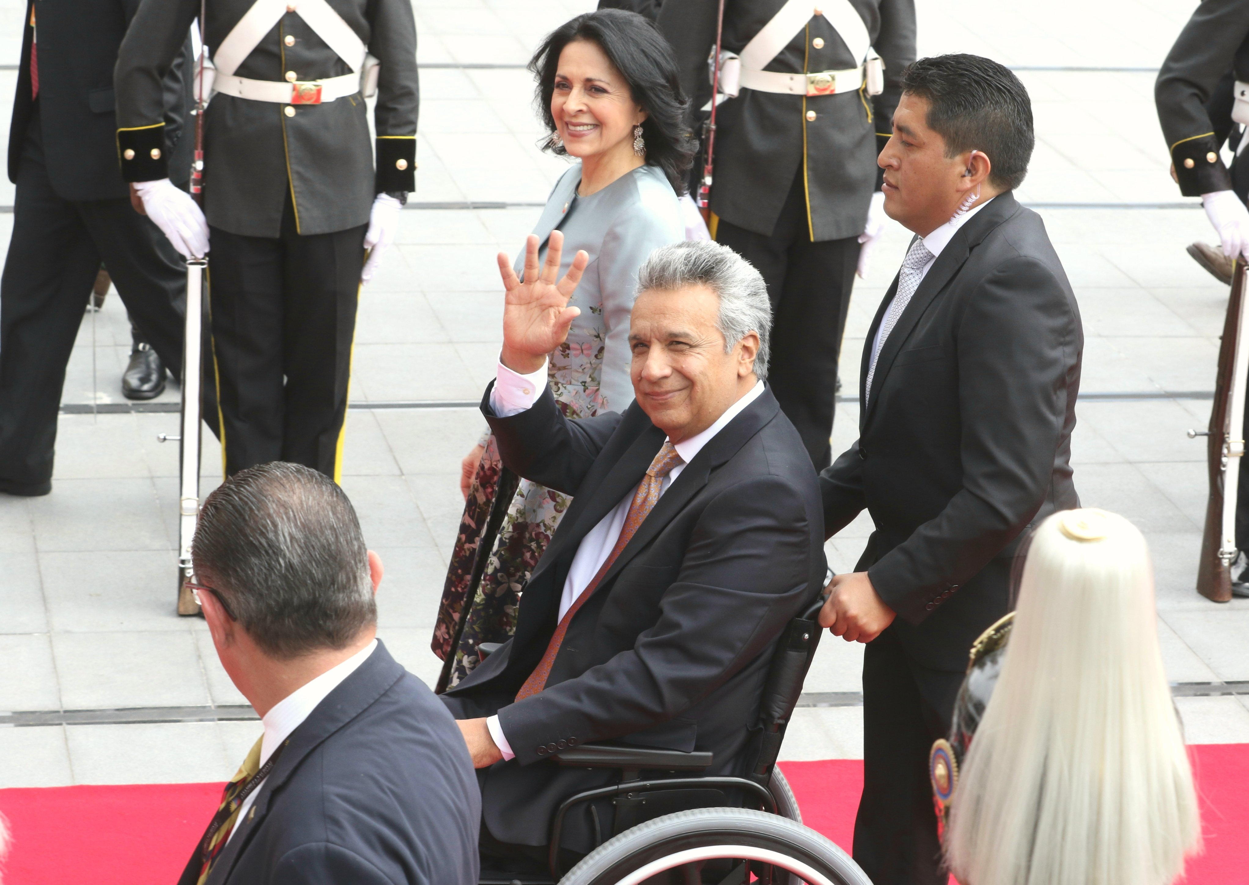 Quito, 24 de mayo de 2017 (Andes).- Varios Mandatarios y delegaciones extranjeras asistieron este 24 de mayo a la Ceremonia de Transmisión del Mando Presidencial del Ecuador. ANDES/Micaela Ayala V.